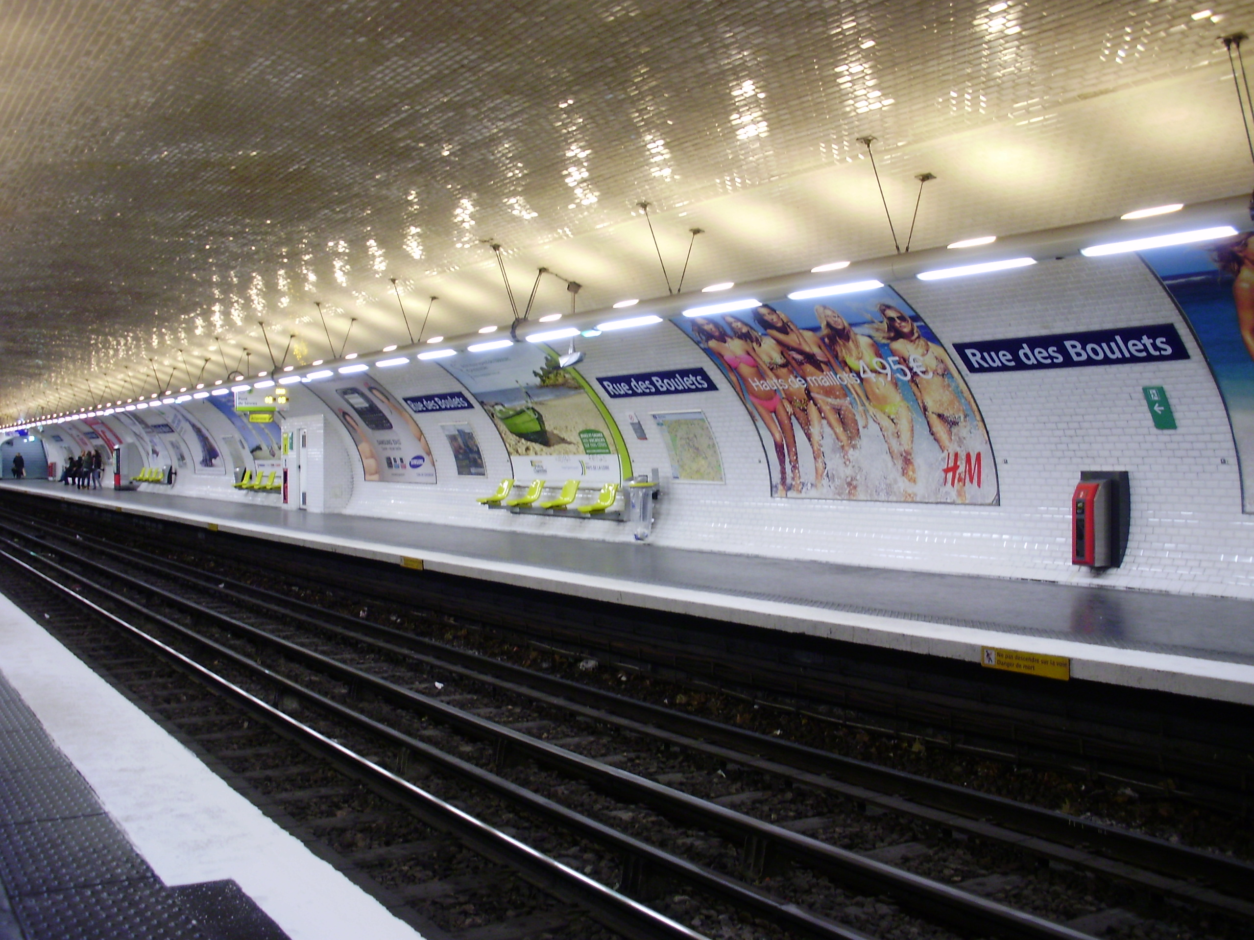 Quai vers « Pont de Sèvres » de la station « Rue des Boulets » du métro de Paris